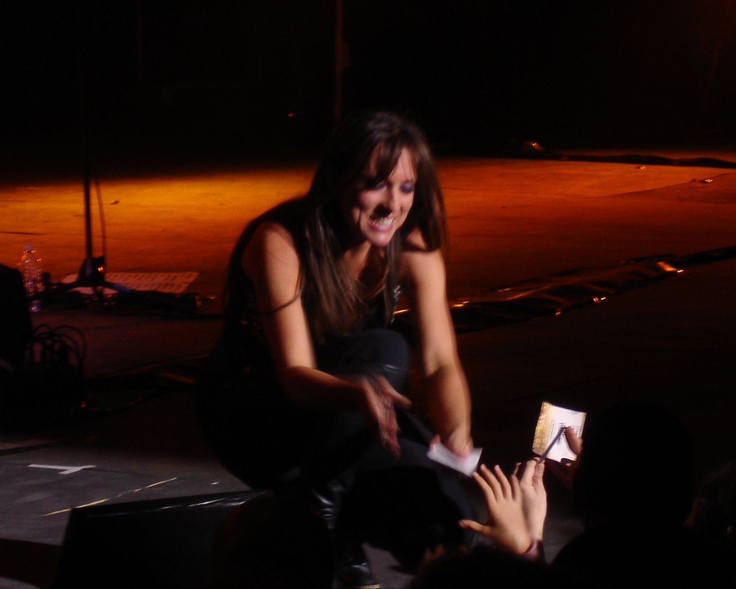 France, Aude (11), Carcassonne, festival de la cité juillet 2007, concert de Lynda Lemay